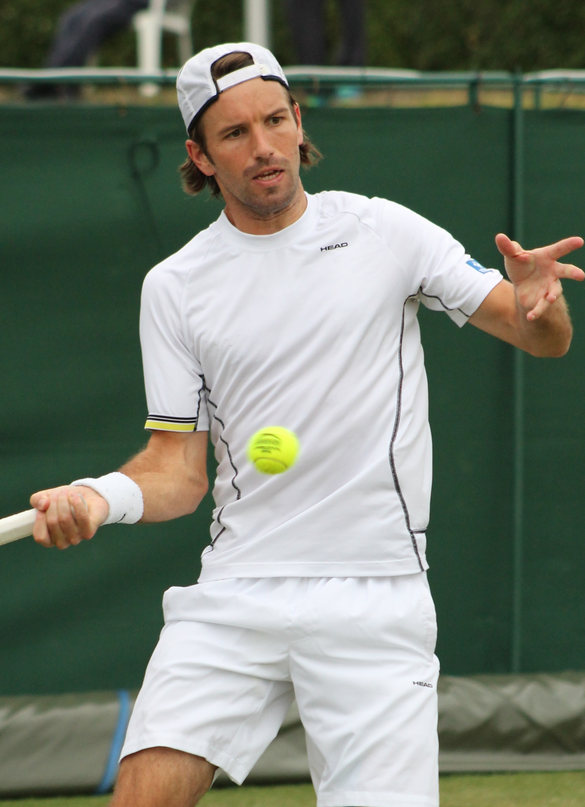 Kretschmer WMQ14 (14)